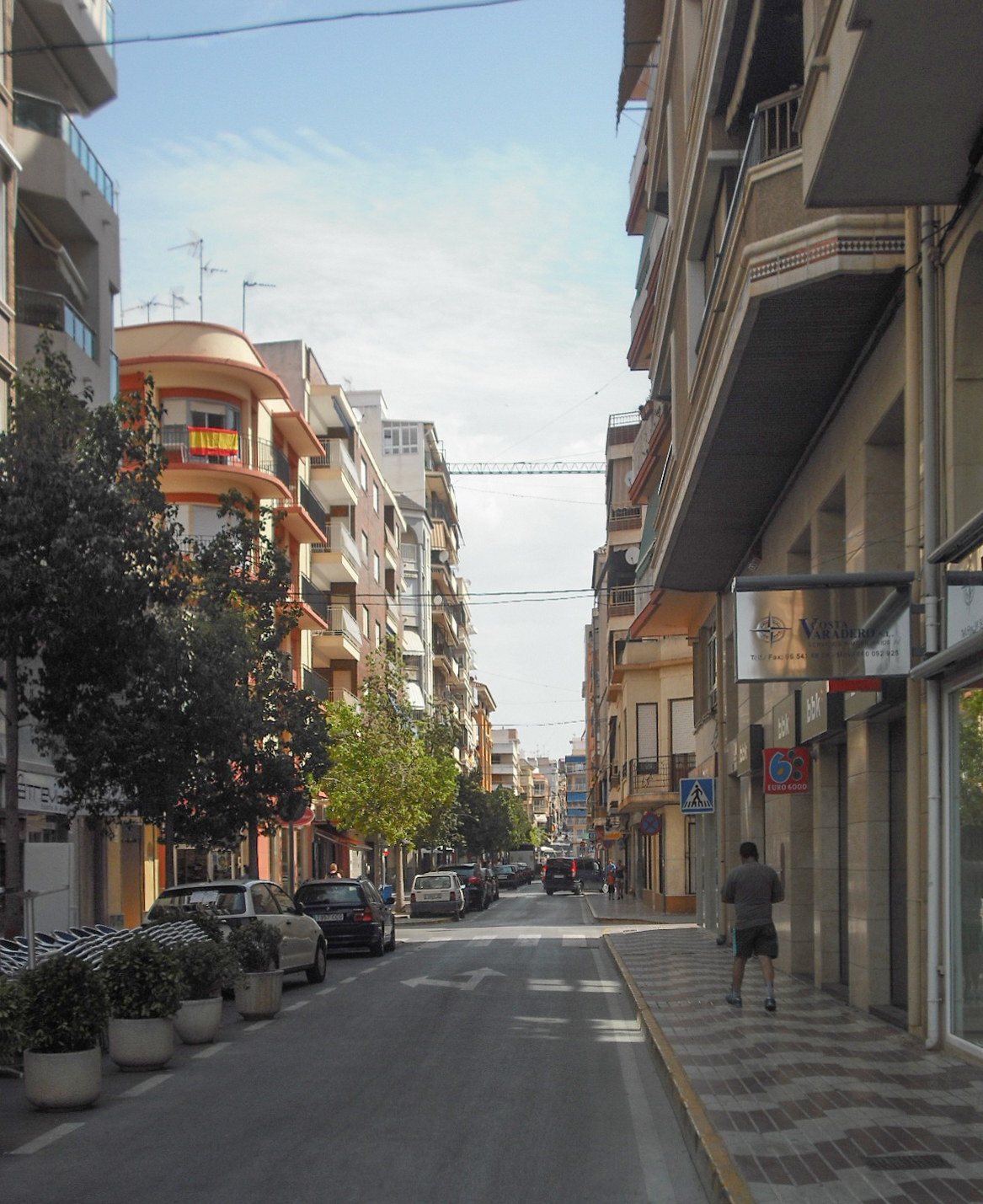 Carrer del Moll.